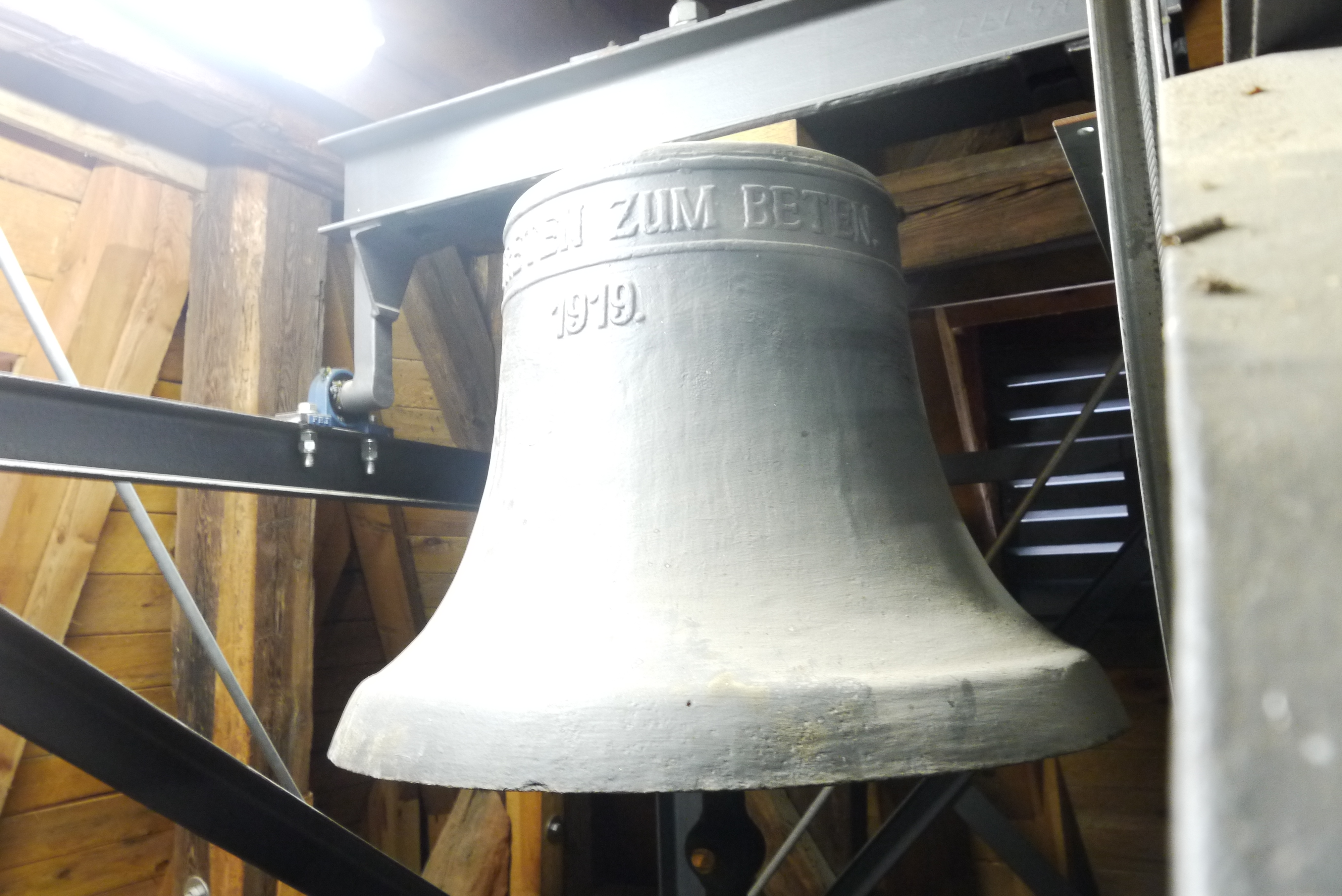 Eine, der drei Glocken der evangelischen Dorfkirche in Nieder Neuendorf